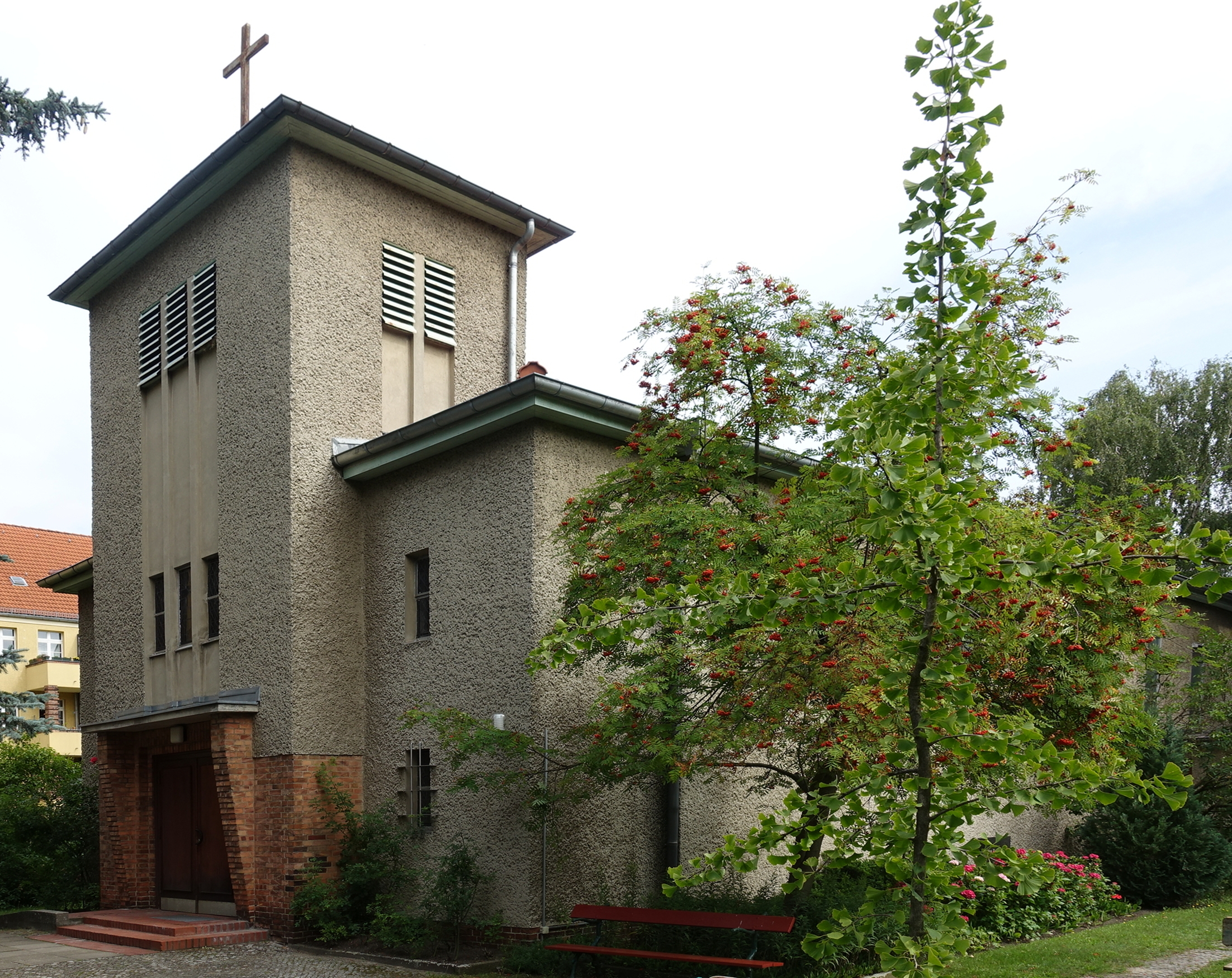 Schrägansicht auf die Kirche